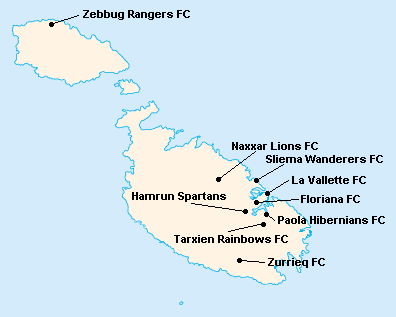 Répartition des clubs en Premier League Maltaise 1989-1990.